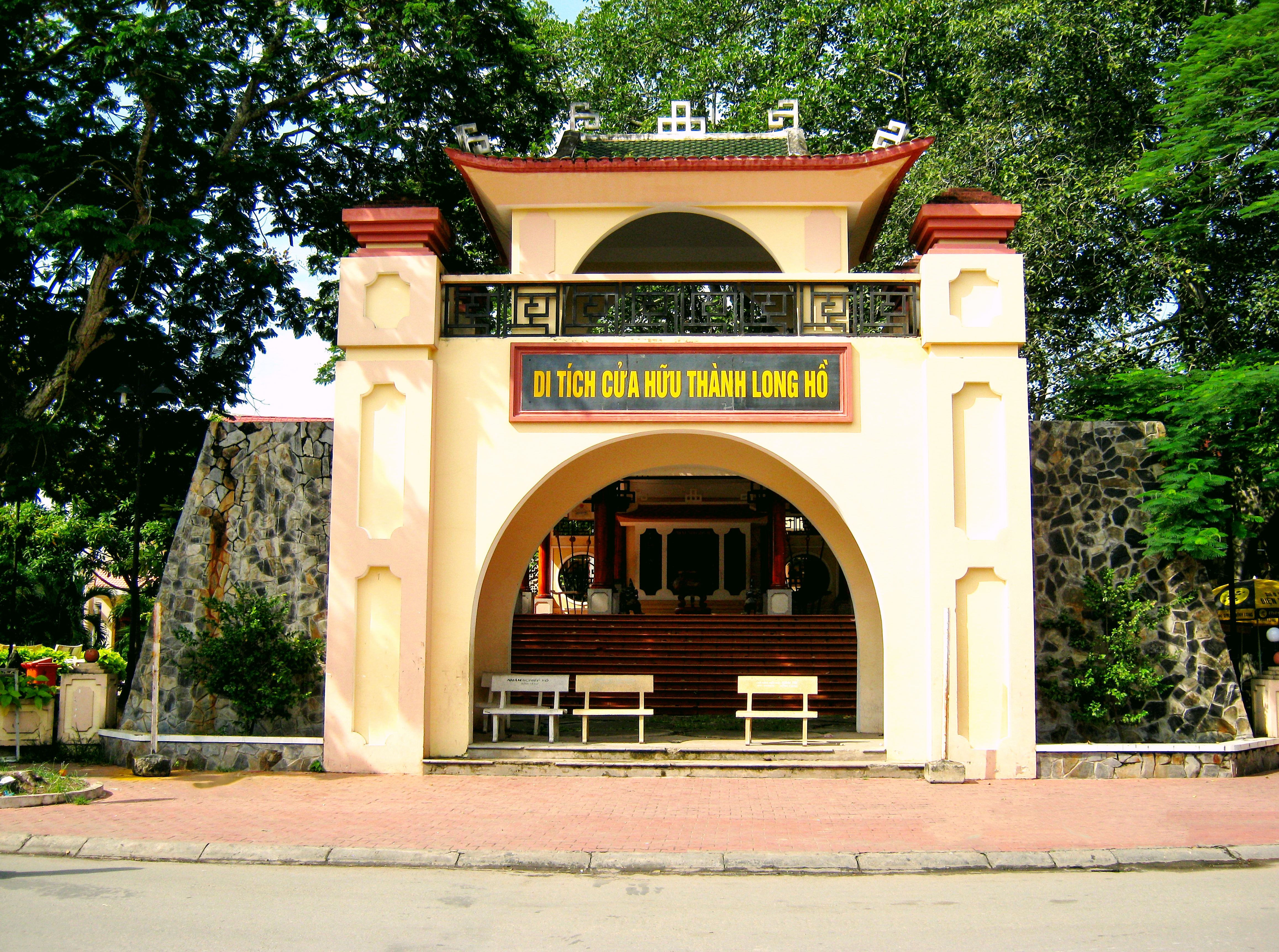 Cửa Hữu thành Long Hồ (tức thành Vĩnh Long) thời Nguyễn trong lịch sử Việt Nam (di tích phục dựng để kỷ niệm).